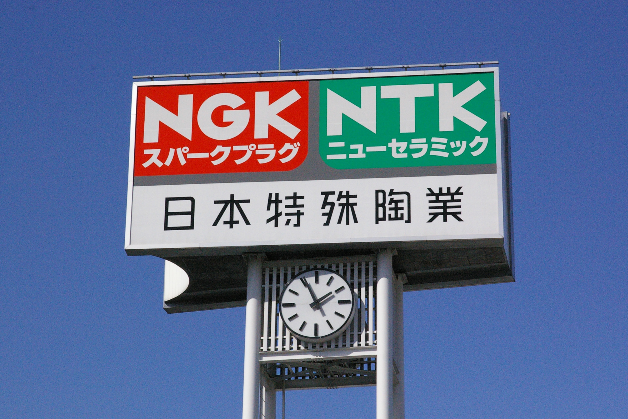 日本特殊陶業株式会社本社にある看板構造物